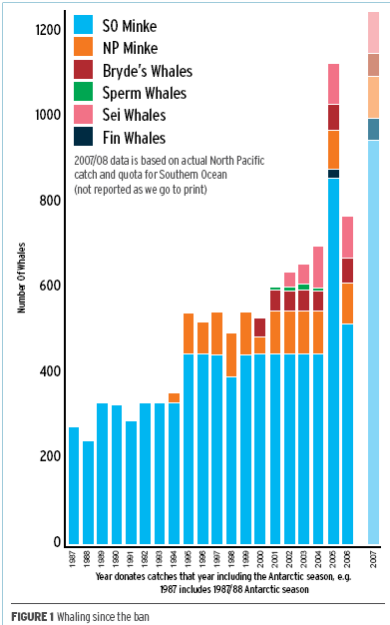 whaling since the ban